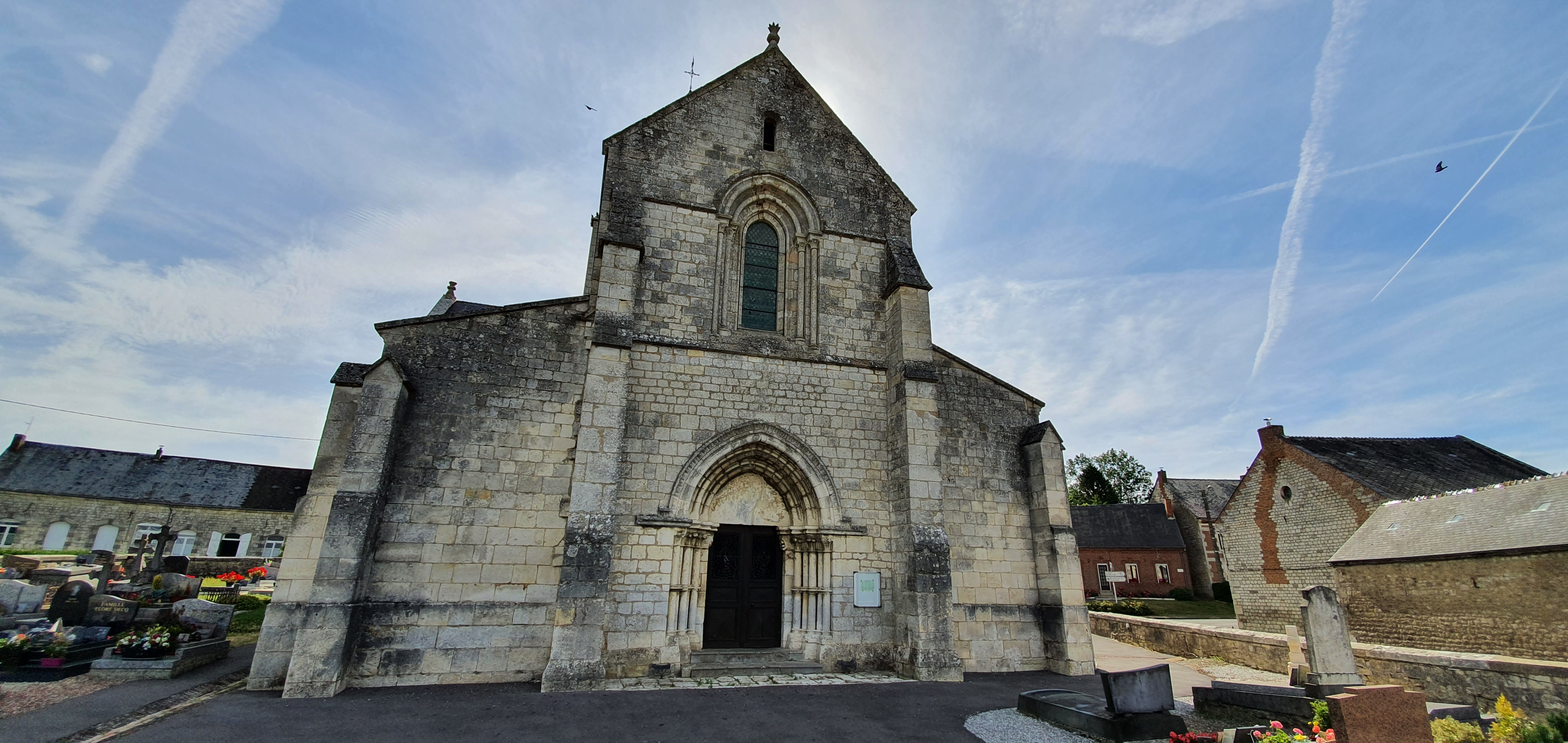 Église Saint-Jean-Baptiste d'Hannappes (03 von 26)